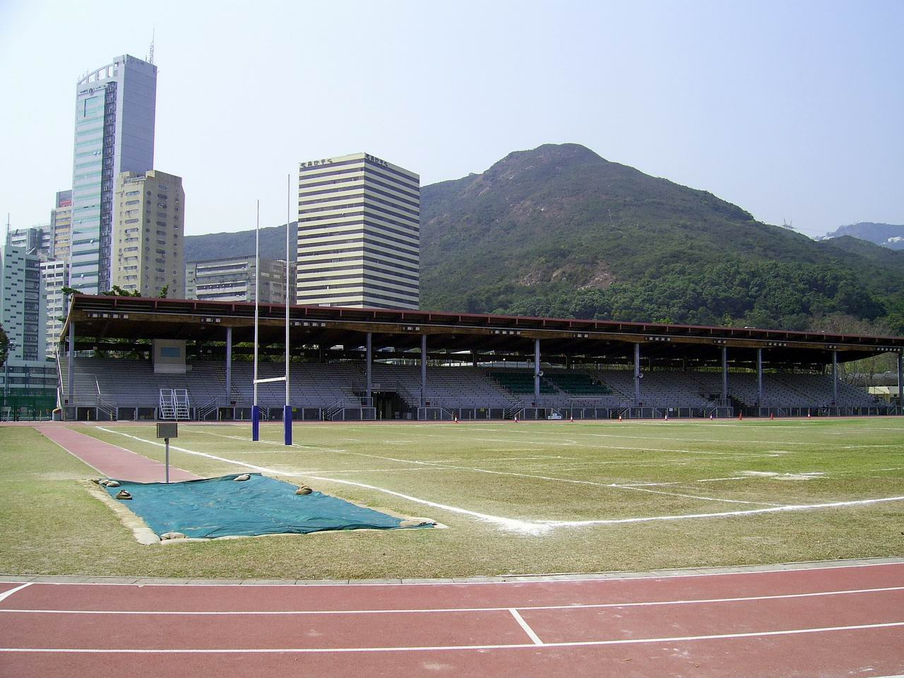 香港仔運動場